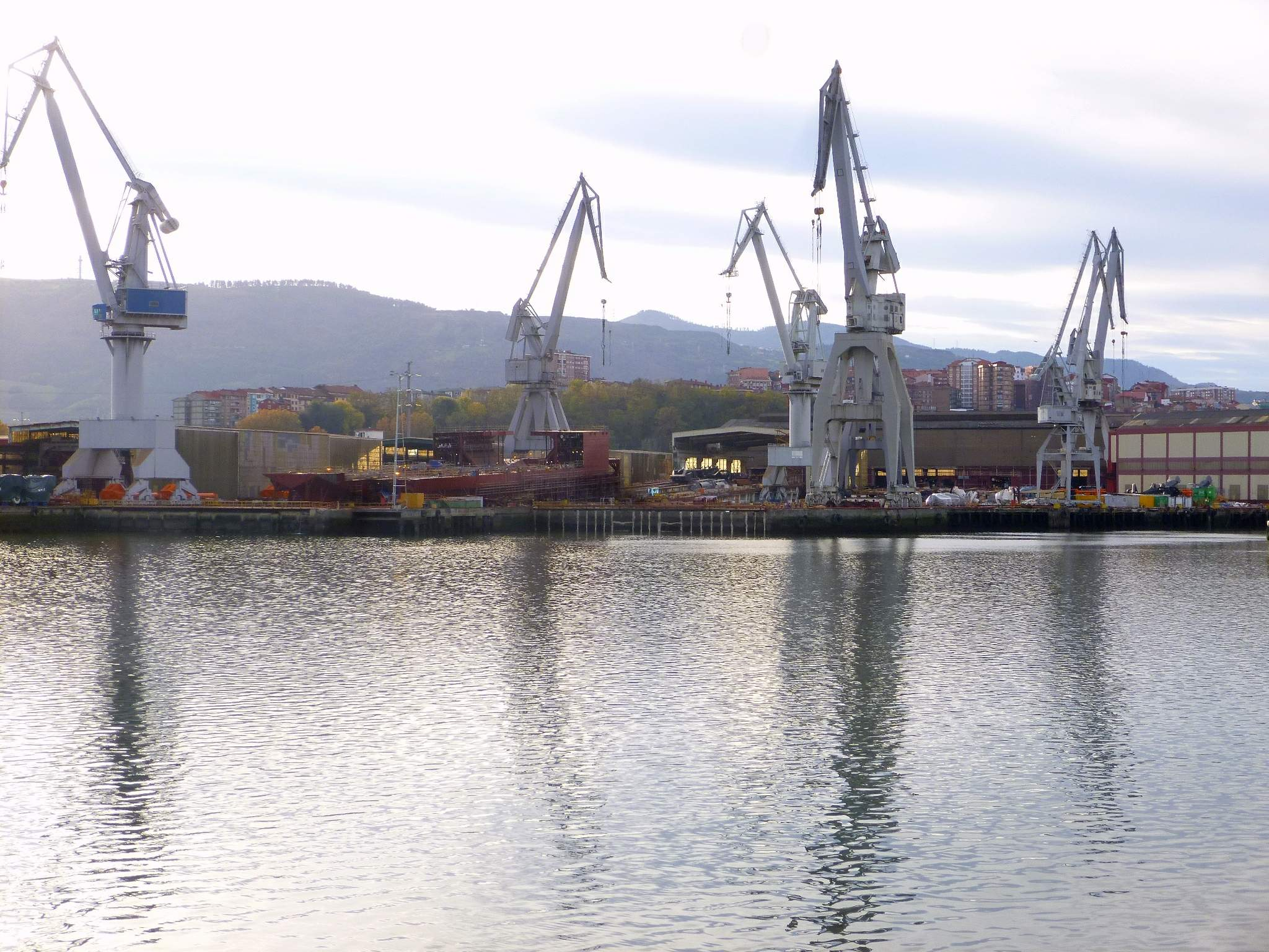 Sestao - Astilleros La Naval-Construcciones Navales del Norte